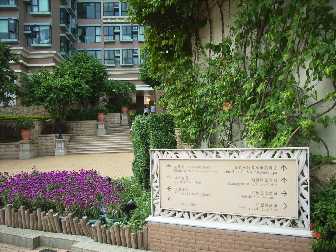 珀麗灣屋苑及私人會所, 路標指南